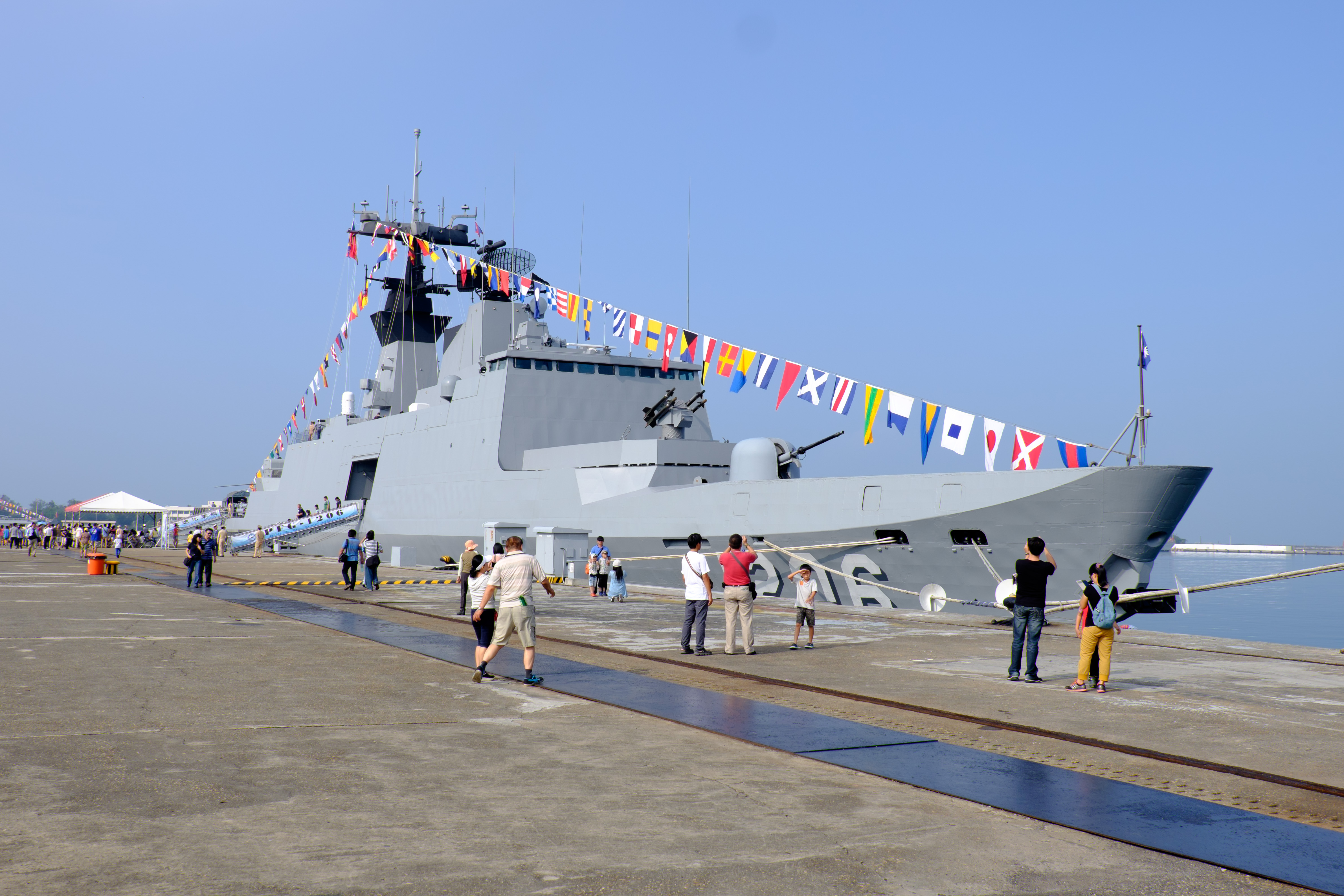 2015年左營軍港營區開放活動清晨，東四號碼頭開放參觀中的巡防艦迪化（PFG-1206）。